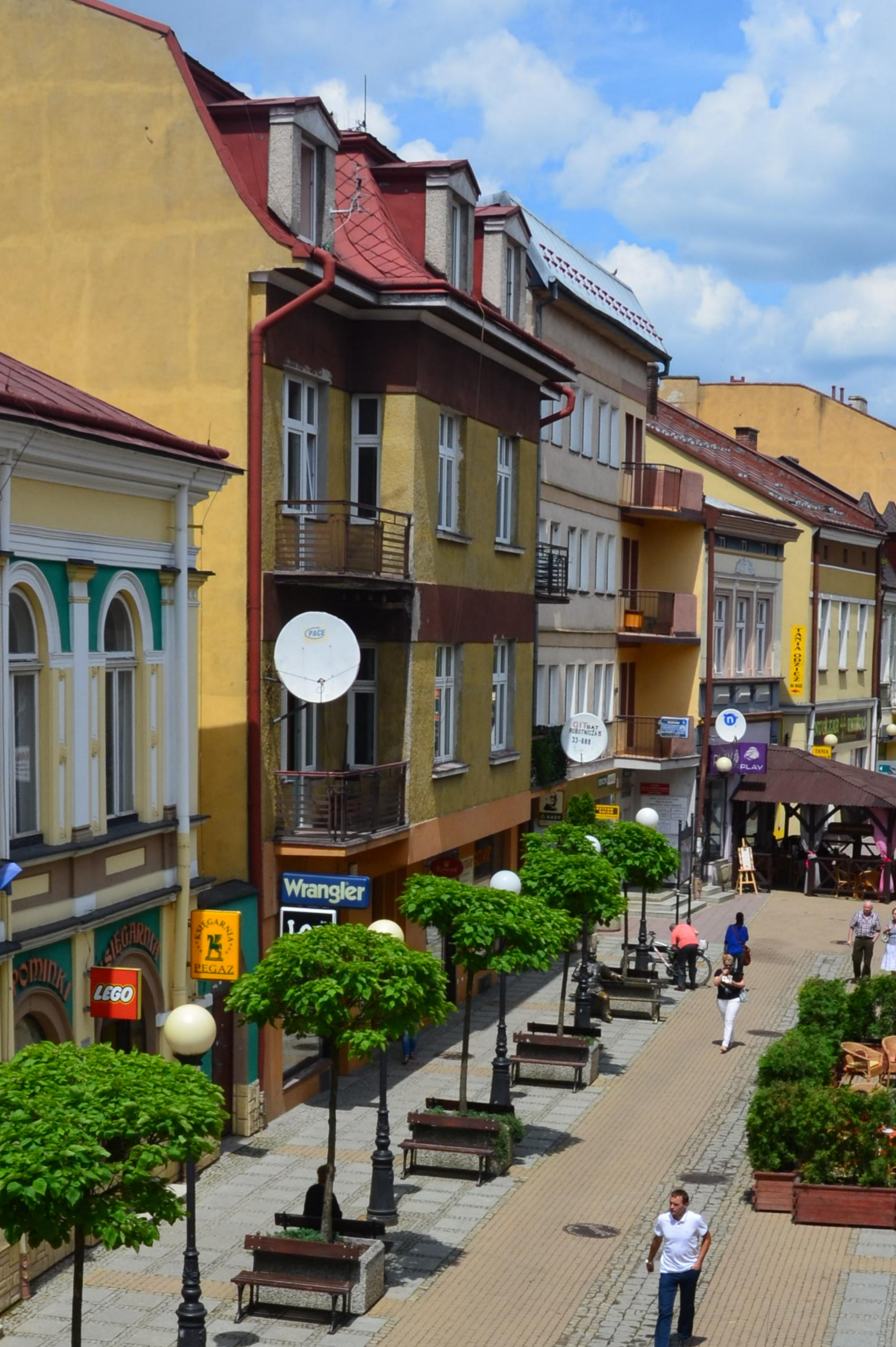 3.Mai-Straße in Sanok